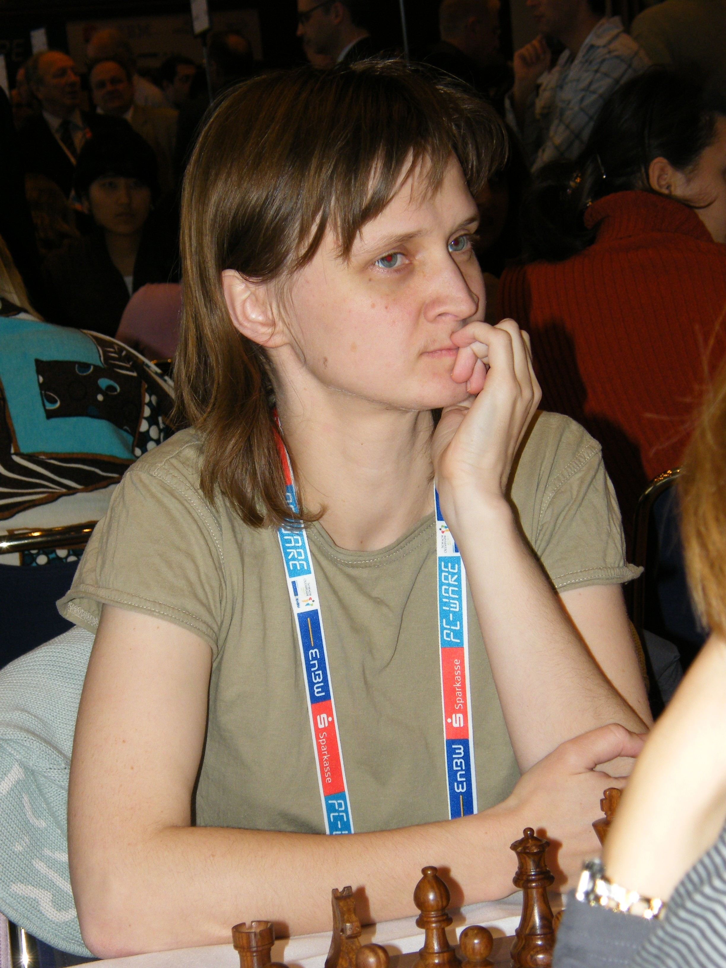 Dagne Ciuksyte bei der 38. Schacholympiade in Dresden 2008